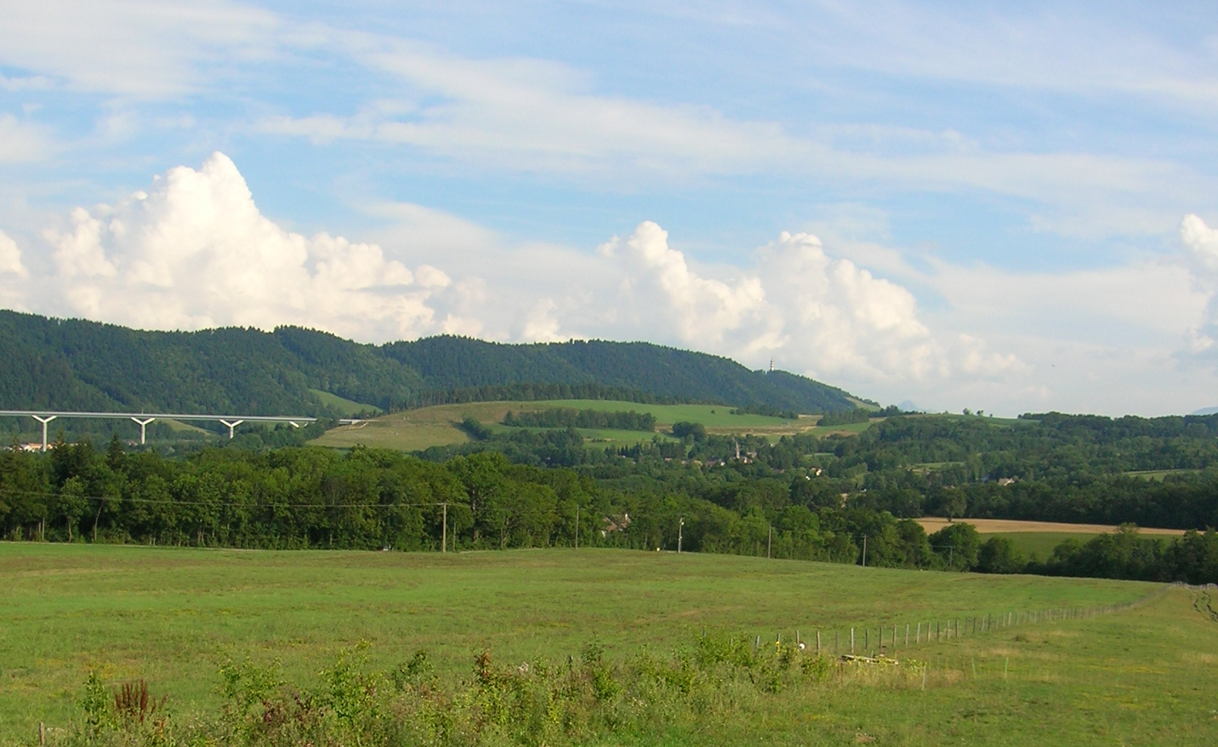 Saint-Paul-lès-Monestier, Isère, France.